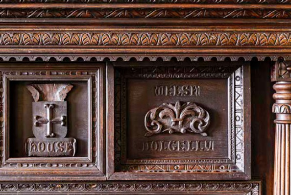 Rhan Dde Aelwyd Southover Grange - Llun gyda chaniatâd Carlotta Luke (2016)